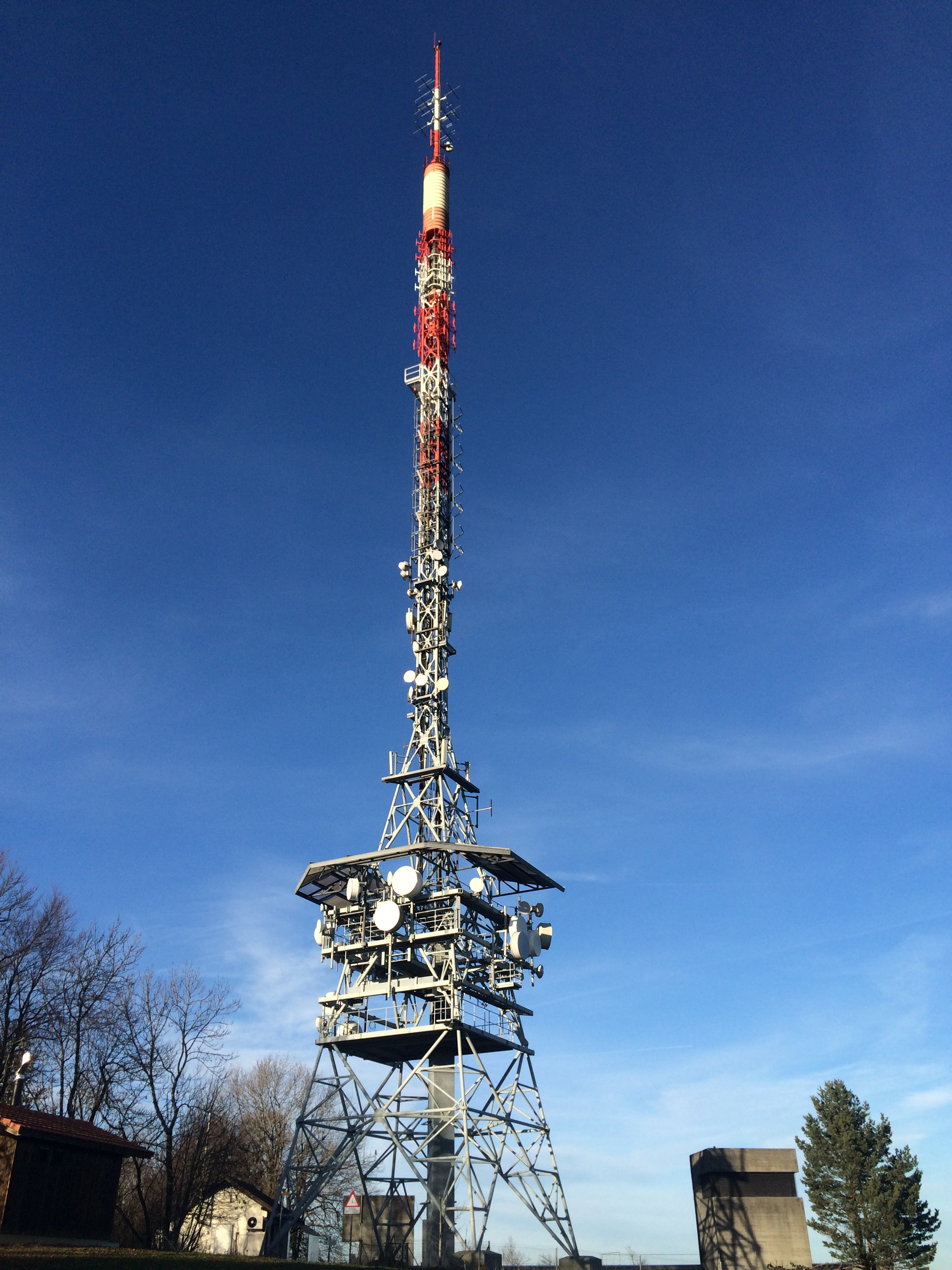 Émetteur de télévision situé sur le sommet " Les Ordons " dans le Jura Suisse